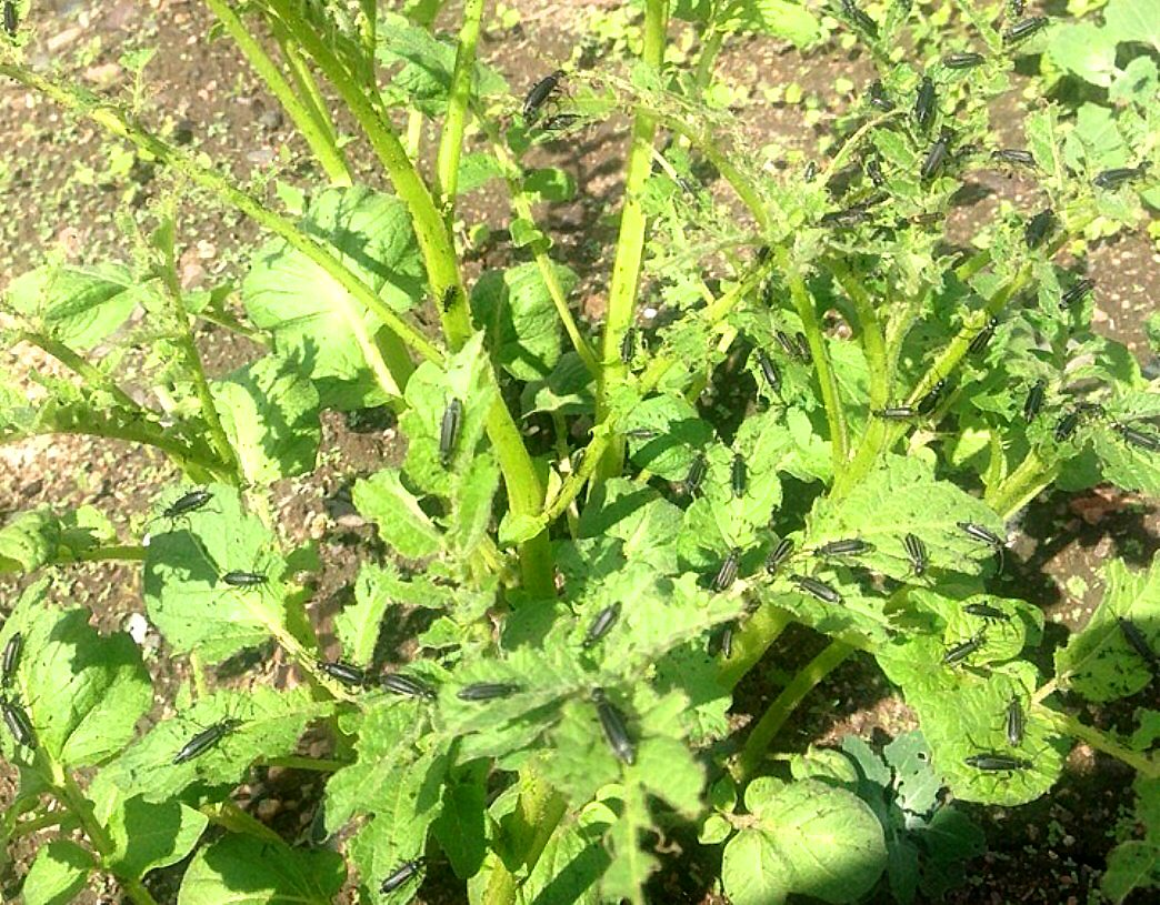 Spanish fly in Siberia